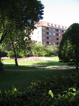 Billede fra Hostrups Haves anlæg i midten af bebyggelsen